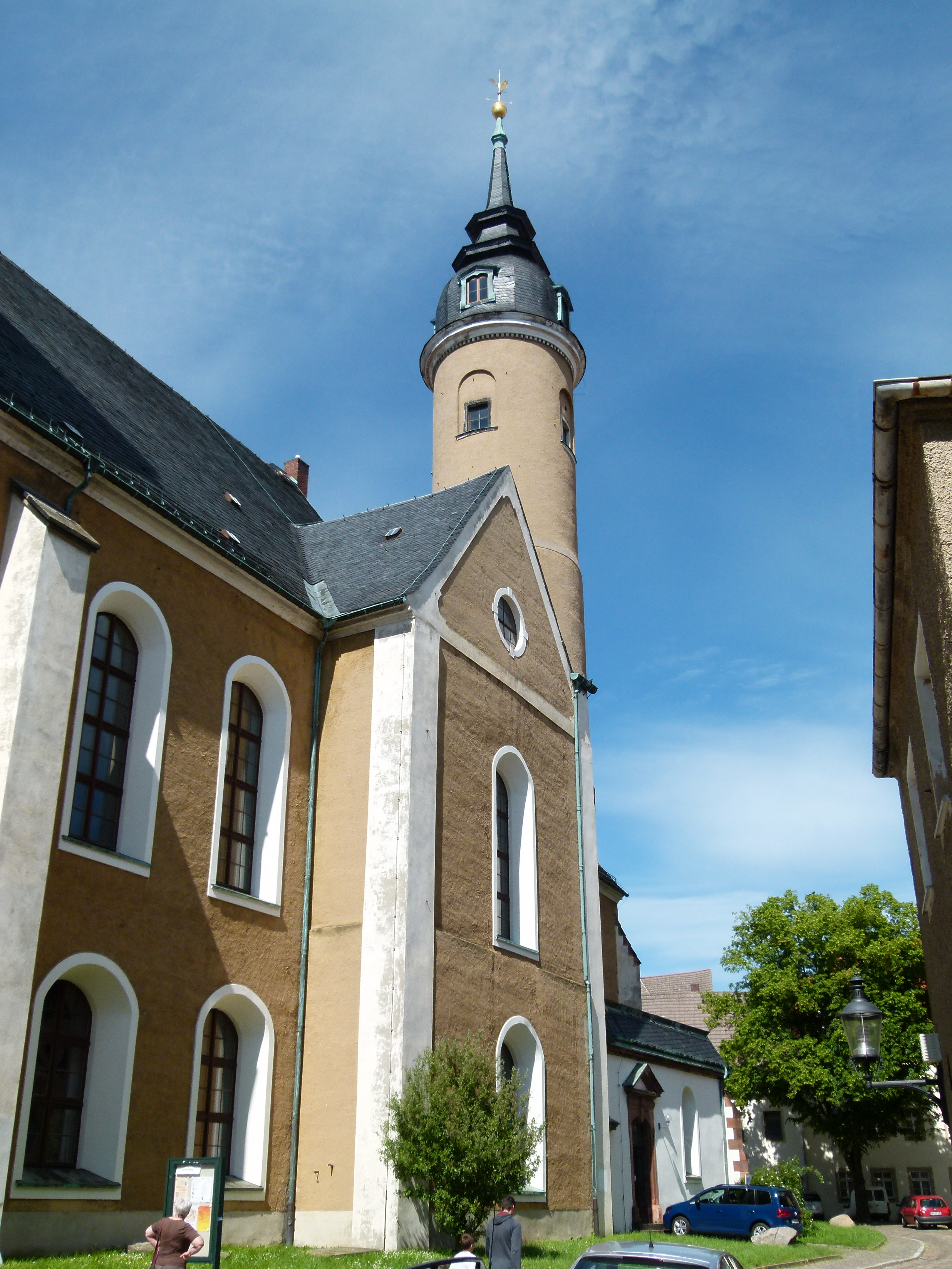 Petrikirche, Freiberg, Sachsen